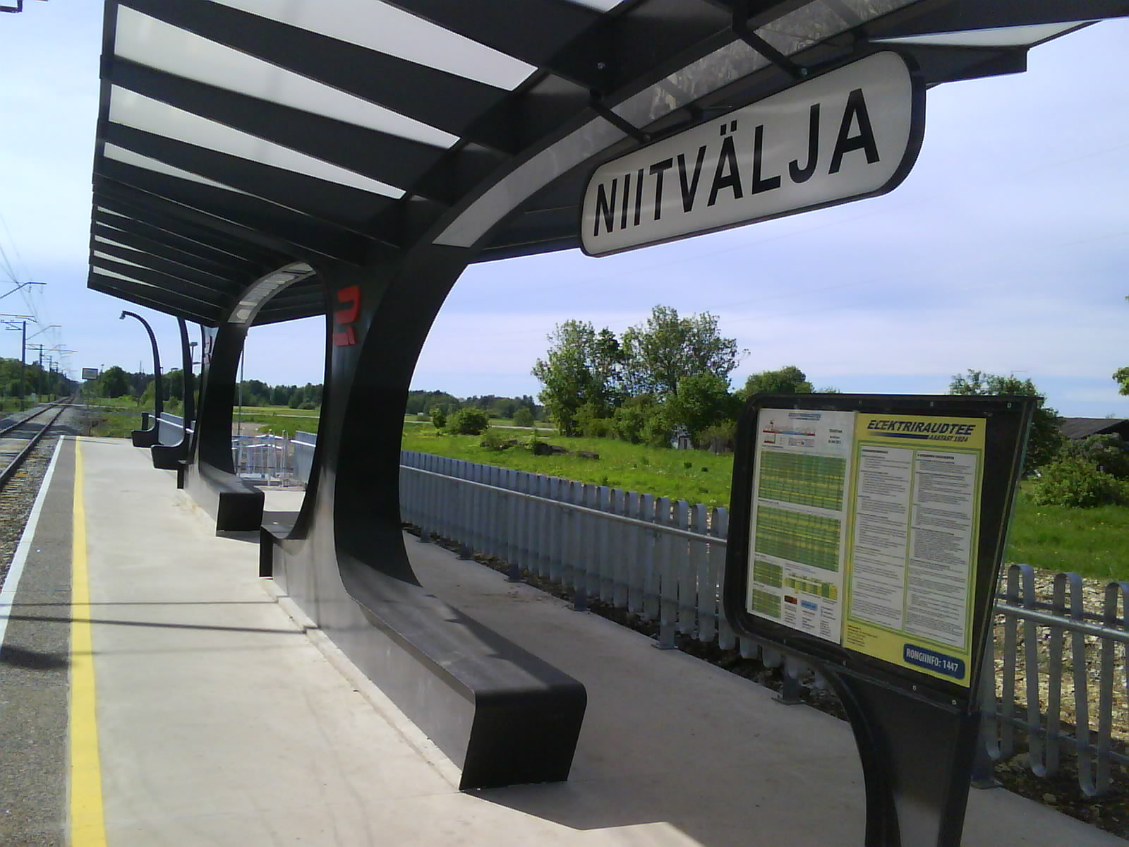 Niitvälja perroon